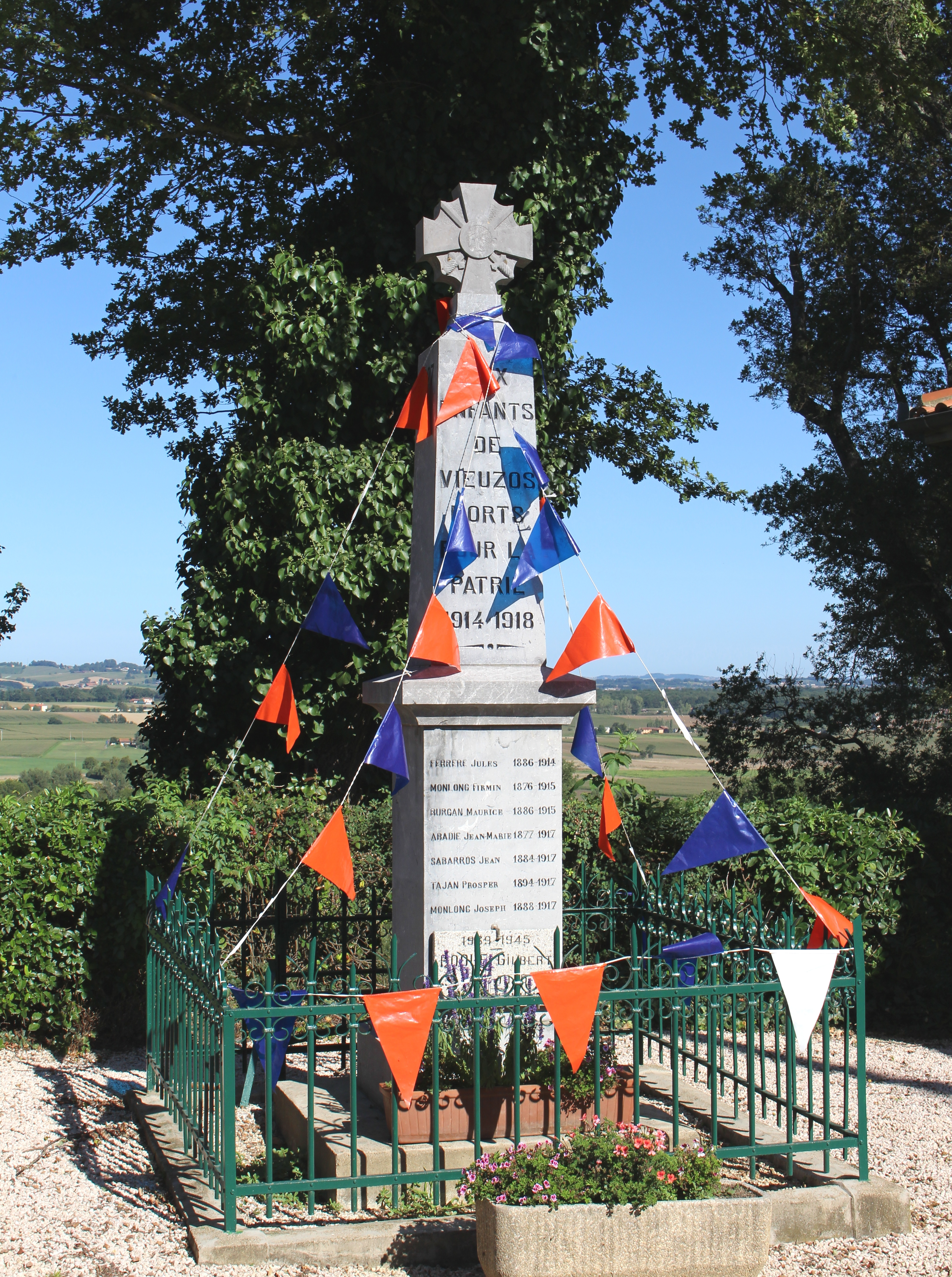 Monument aux morts de Vieuzos (Hautes-Pyrénées)